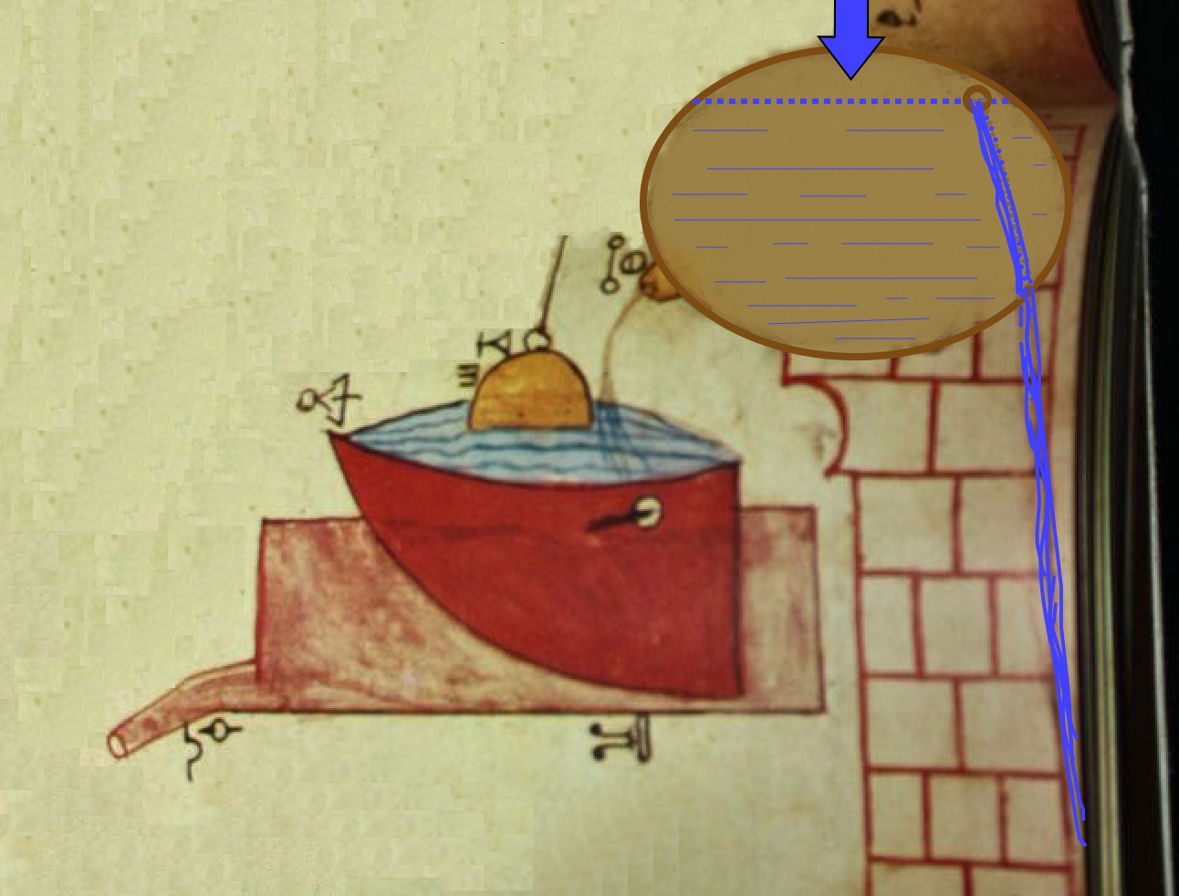 Principe moteur de l'horloge aux paons d'al-Jazari ; d'après un détail d'une vue du "livre des procédés ingénieux".